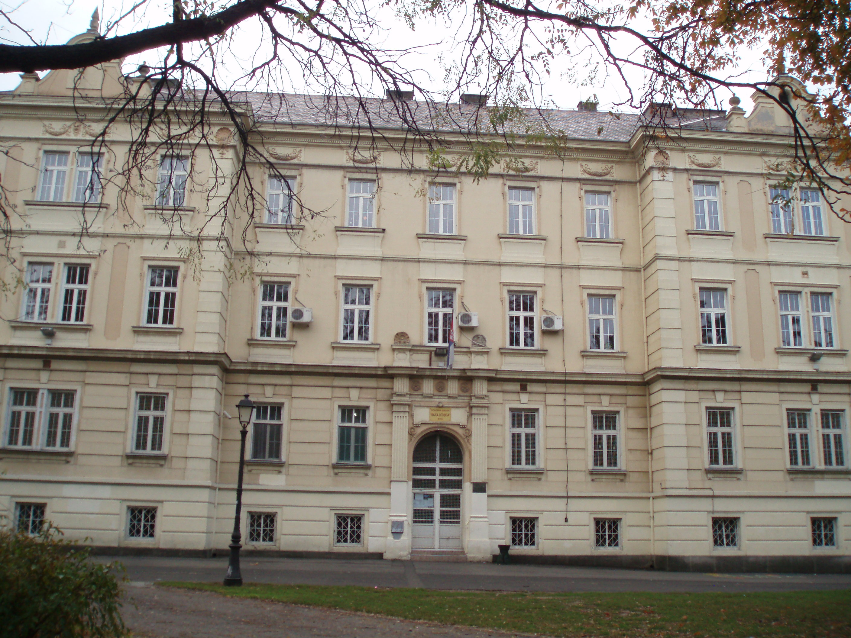 Osnovna škola "Majka Jugovića" u Zemunskom parku, autor fotografije: Nicolo